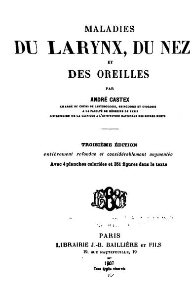 Manuel Castex